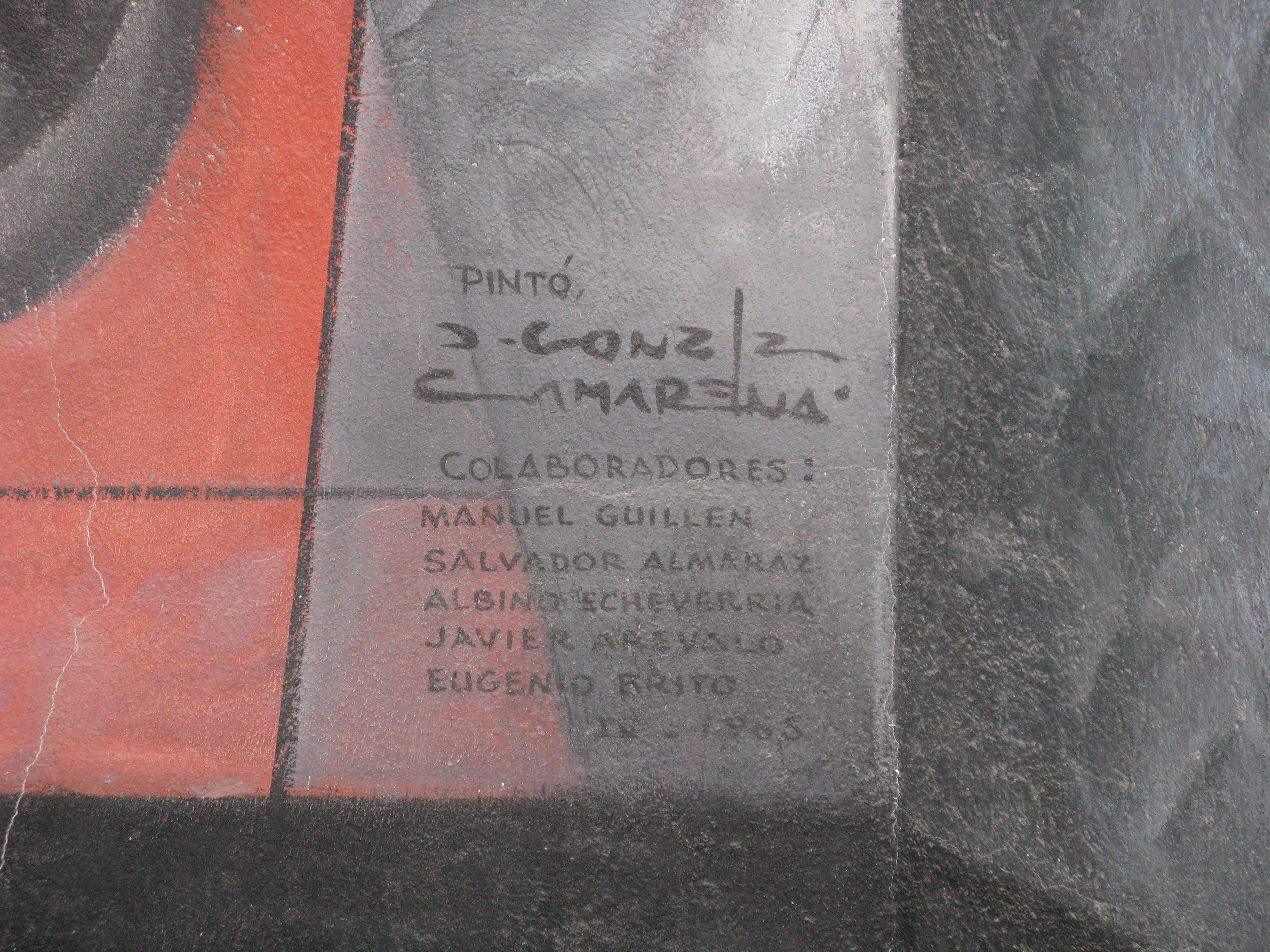 Parte del mural "Presencia de América Latina", ubicado en la Casa del Arte, Universidad de Concepción, Chile